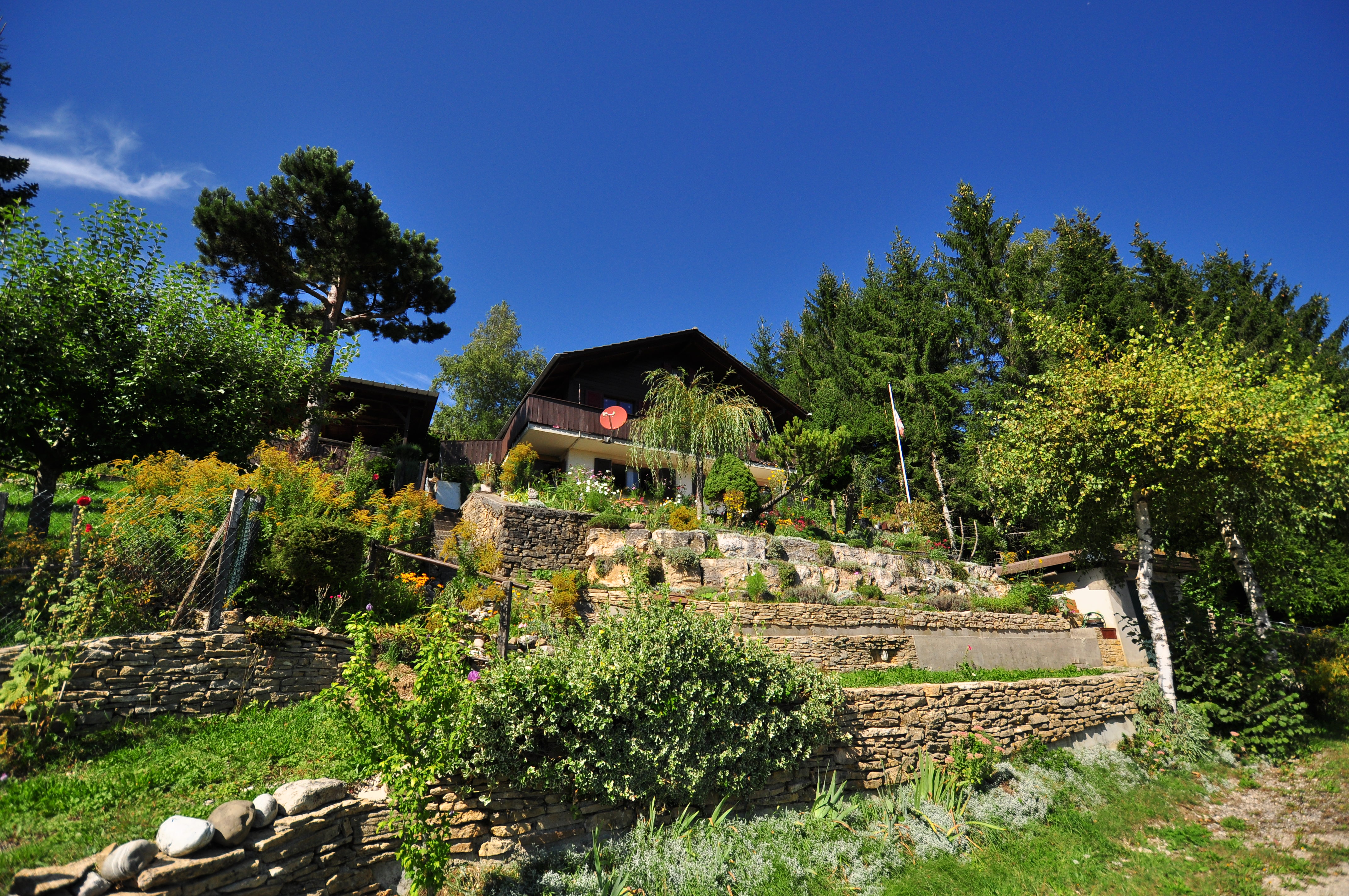 Saint-Brais Le Mont